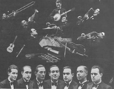 La formació Catalonia Jazz el 1936